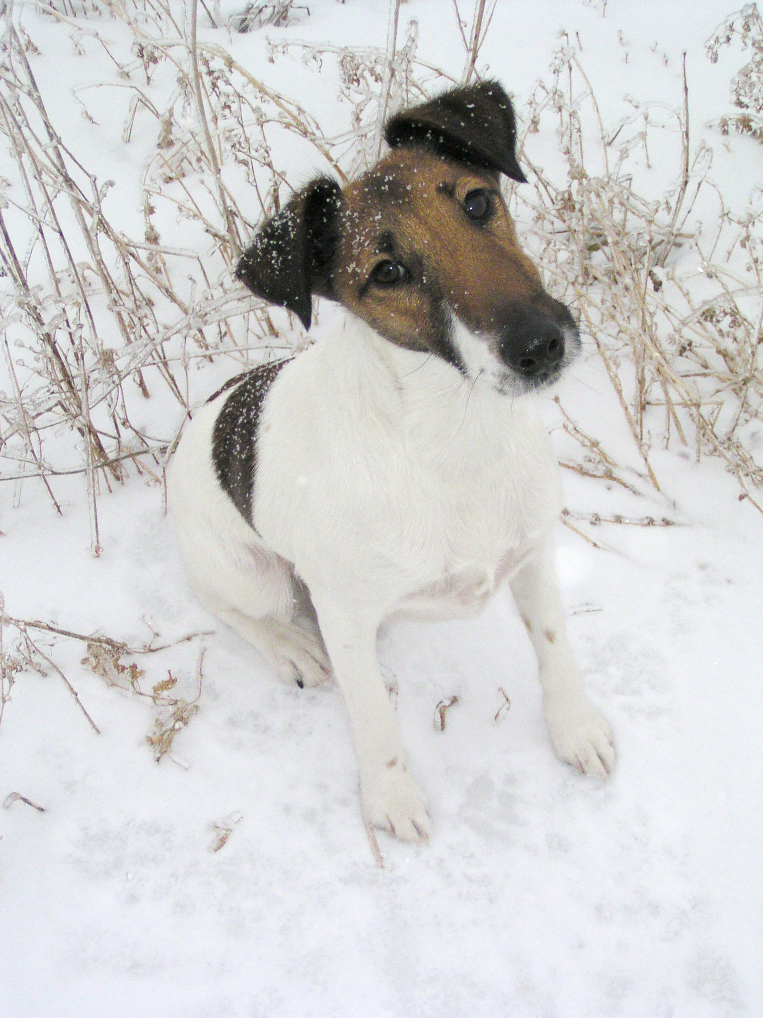 Photo by Martina Vakoničová